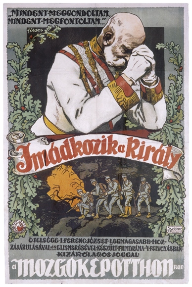 1914-es háborús propaganda plakát az imádkozó Ferenc Józseffel